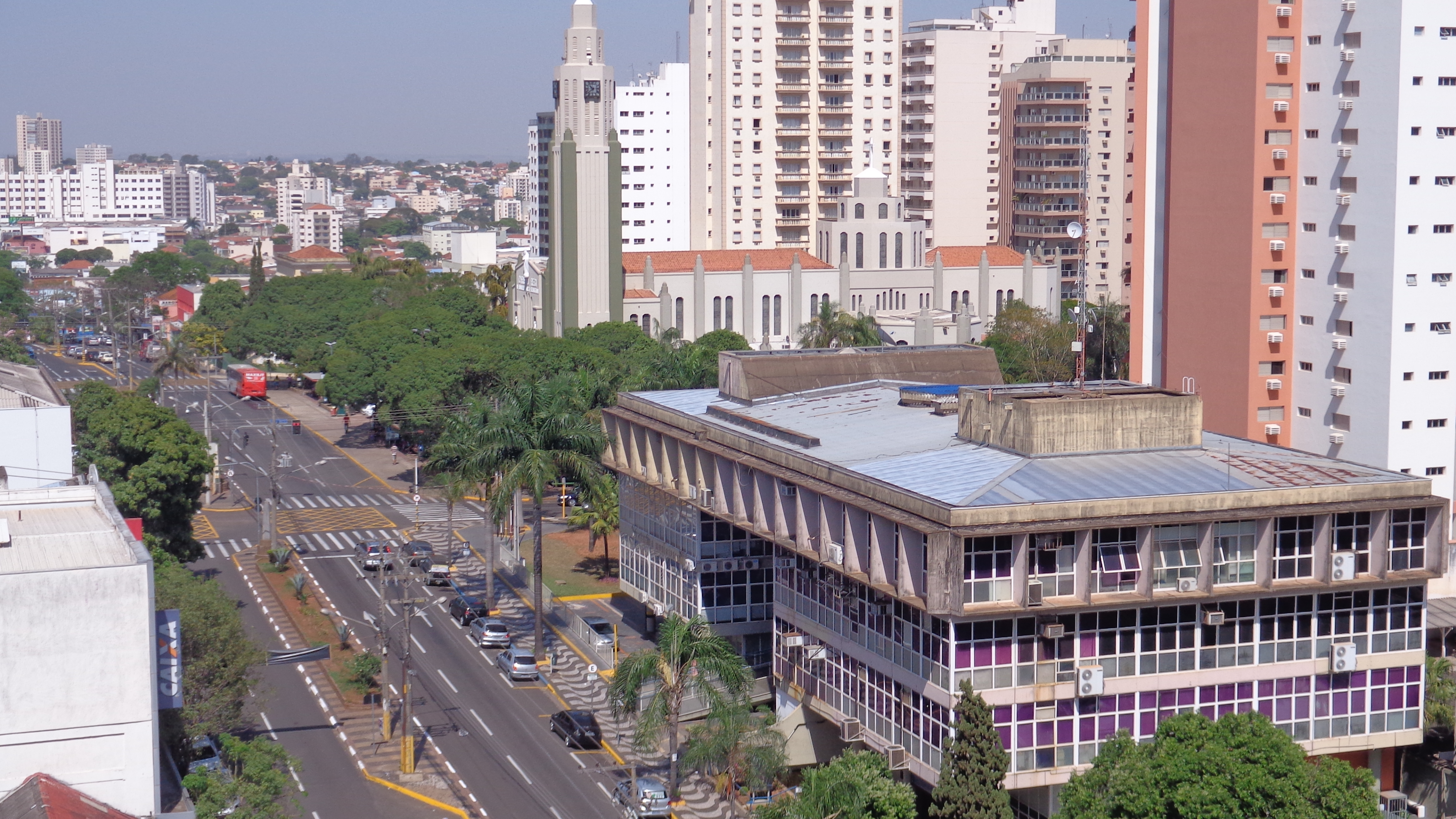 Prefeitura no centro de Presidente Prudente